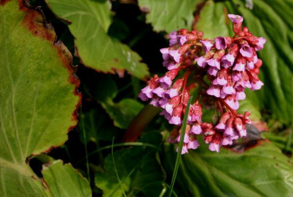 Bergenia cordifolia